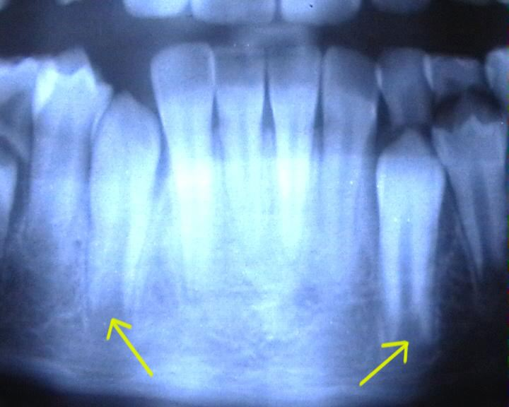 Nicht abgeschlossenes Wurzelwachstum an den Unterkiefer-Eckzähnen